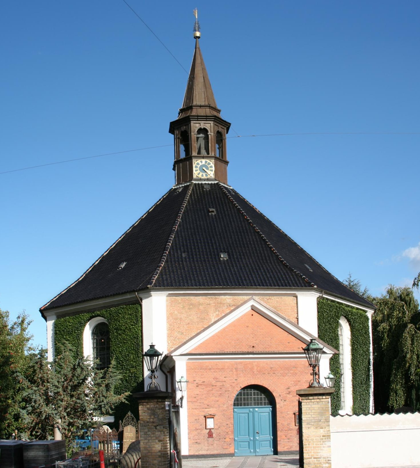 Frederiksberg Kirke, Frederiksberg Sogn, Københavns Stift.